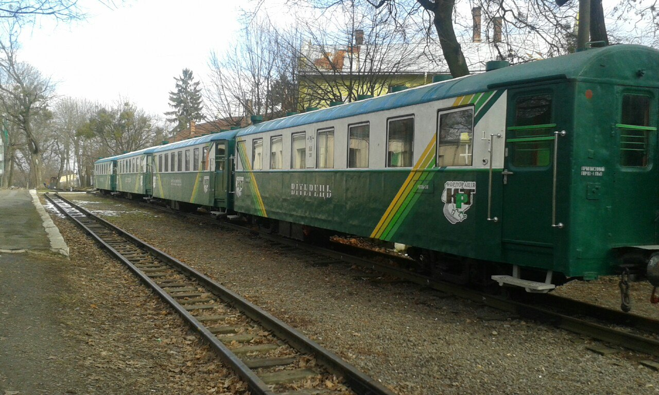 ст. Паркова.